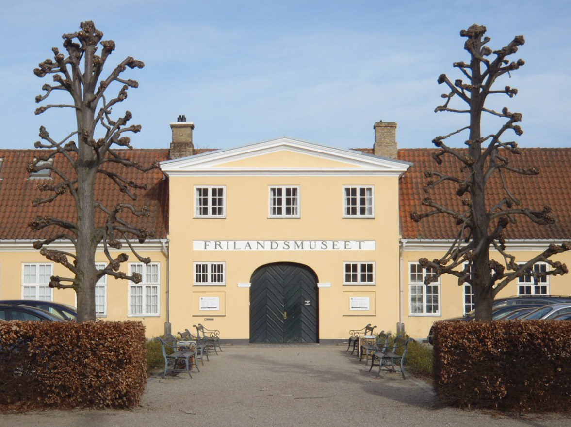 Indgangen til Frilandsmuseet. Symmetrisk taget forfra.